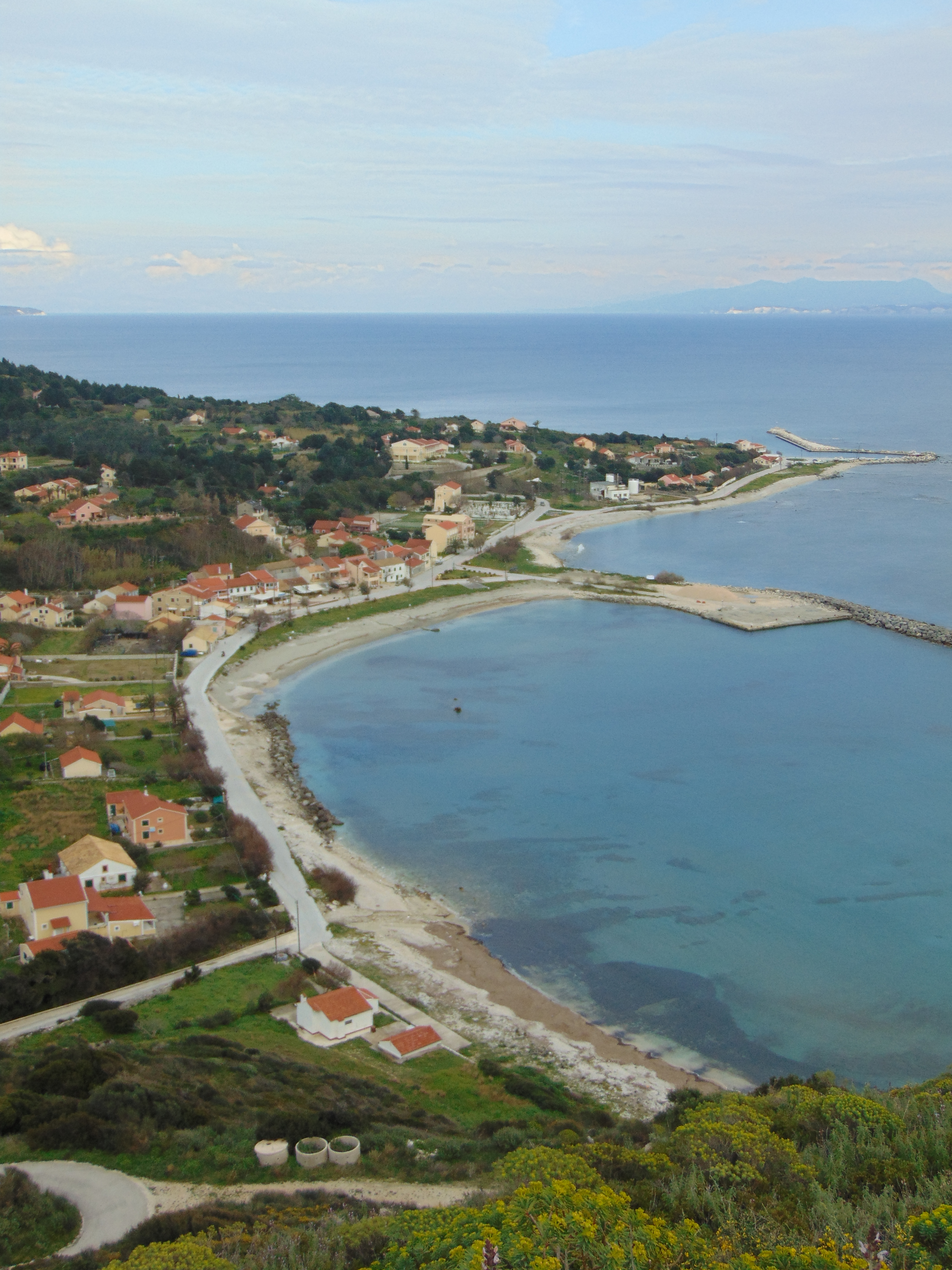 Άμμος Οθωνών